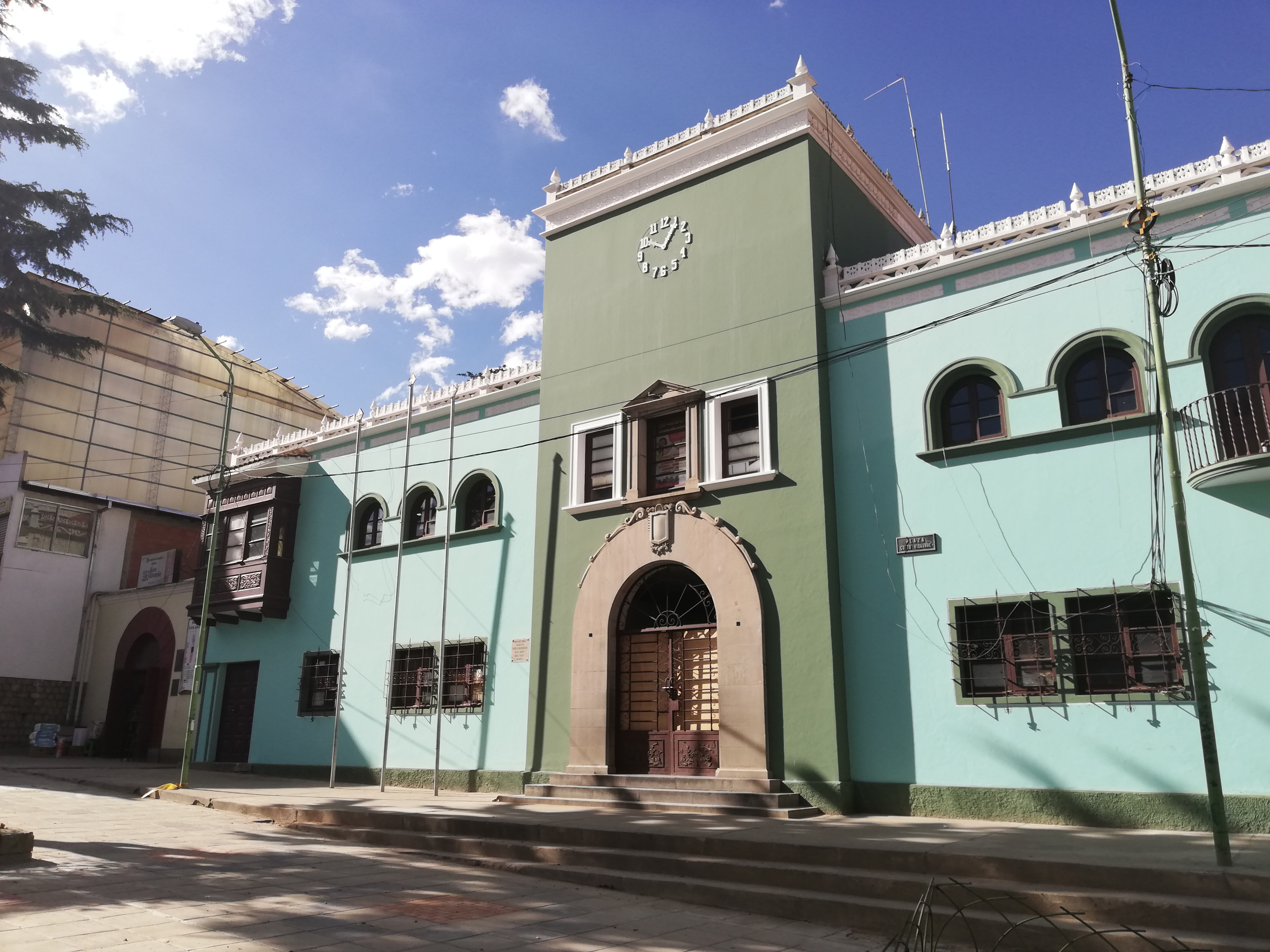 Subalcaldía Macro Distrito Sur This medium shows the protected monument with the number L/00-190 in Bolivia.